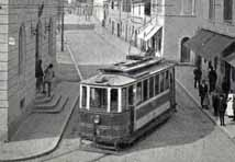 Tram Anzio-Nettuno